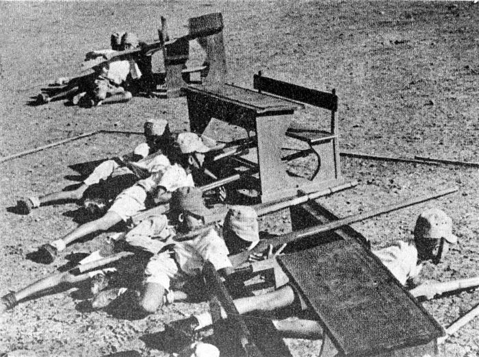 Repronegatief. Indonesische jongens tijdens hun soldatentraining door de Japanners